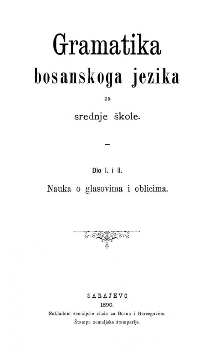 Gramatika bosanskoga jezika iz 1890. godine.